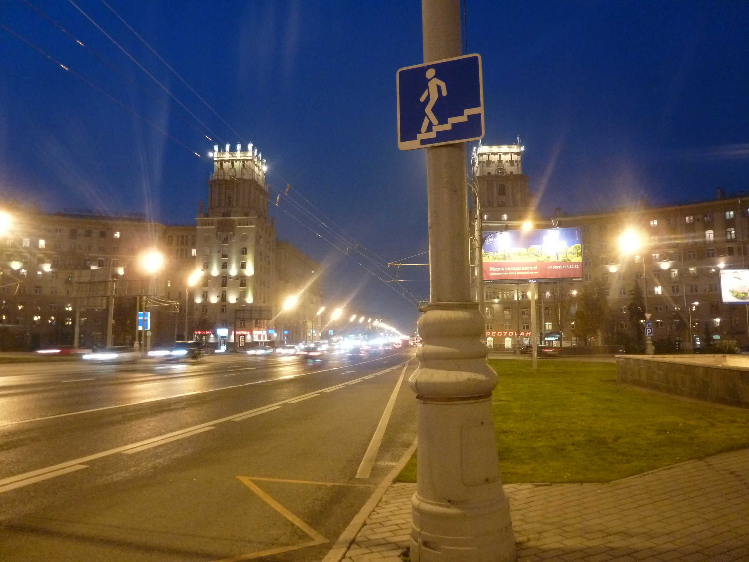 Placo de Gagarin, Moskvo